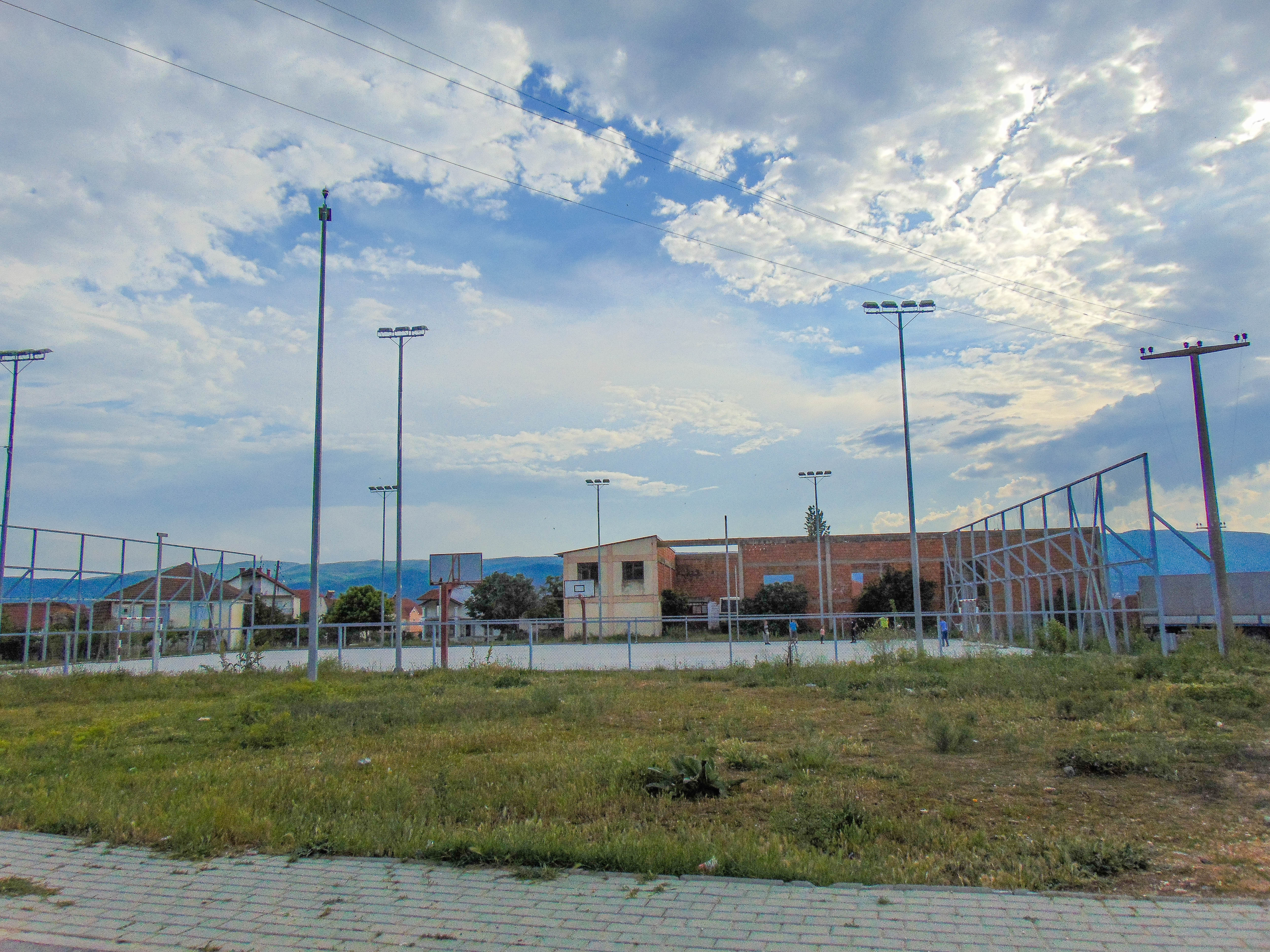 Јаргулица, Општина Радовиш